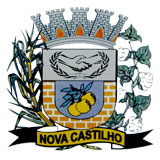 Brasão_do_Municipio_de_Nova_Castilho-SP